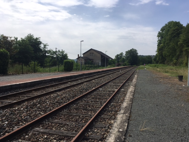 Vue des quais coté Agen avec l'ancienne halle à marchandises, absence de signaux de sortie, caractéristique de cette gare.